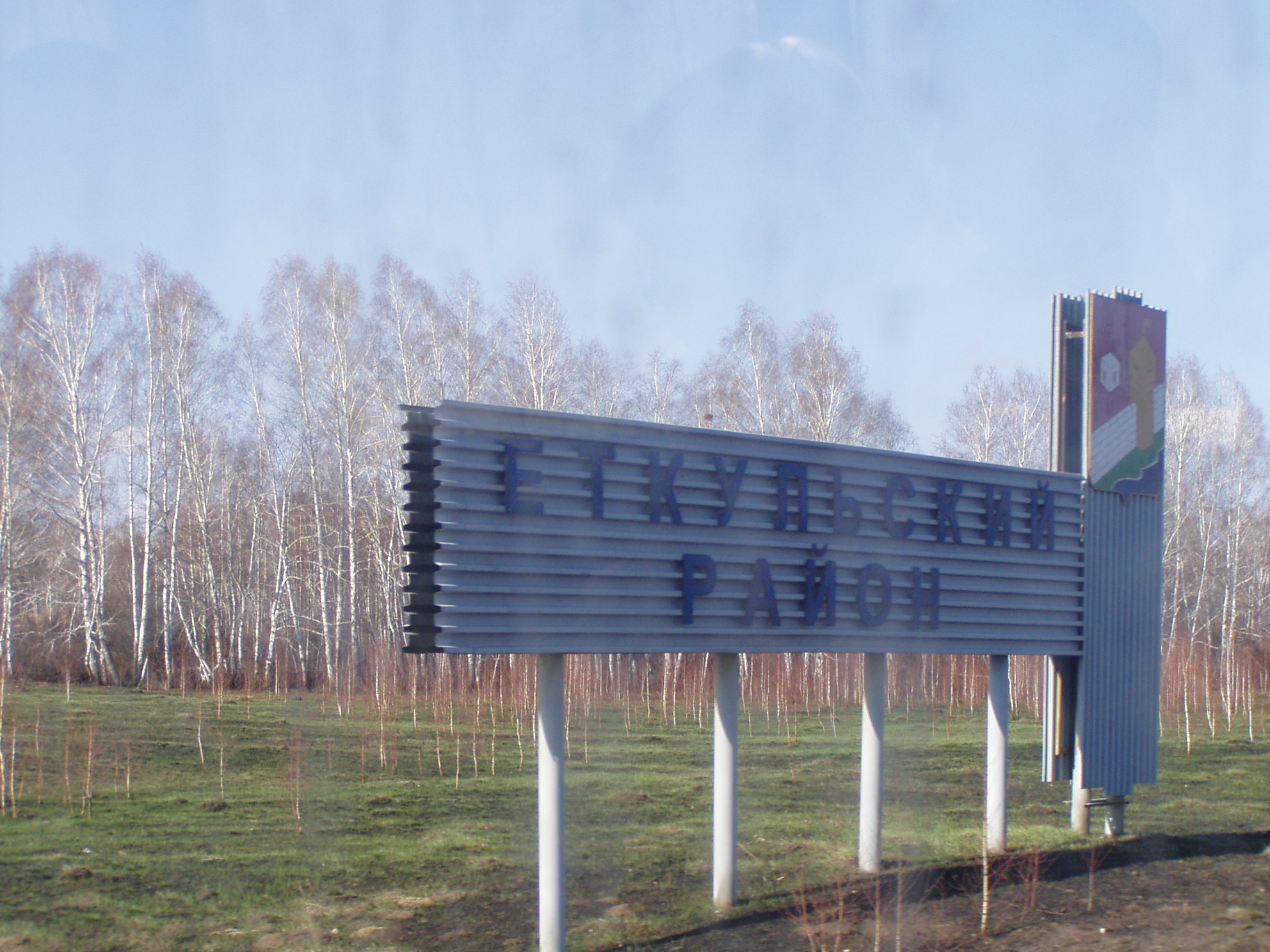 Знак Еткульского района на въезде со стороны Челябинска